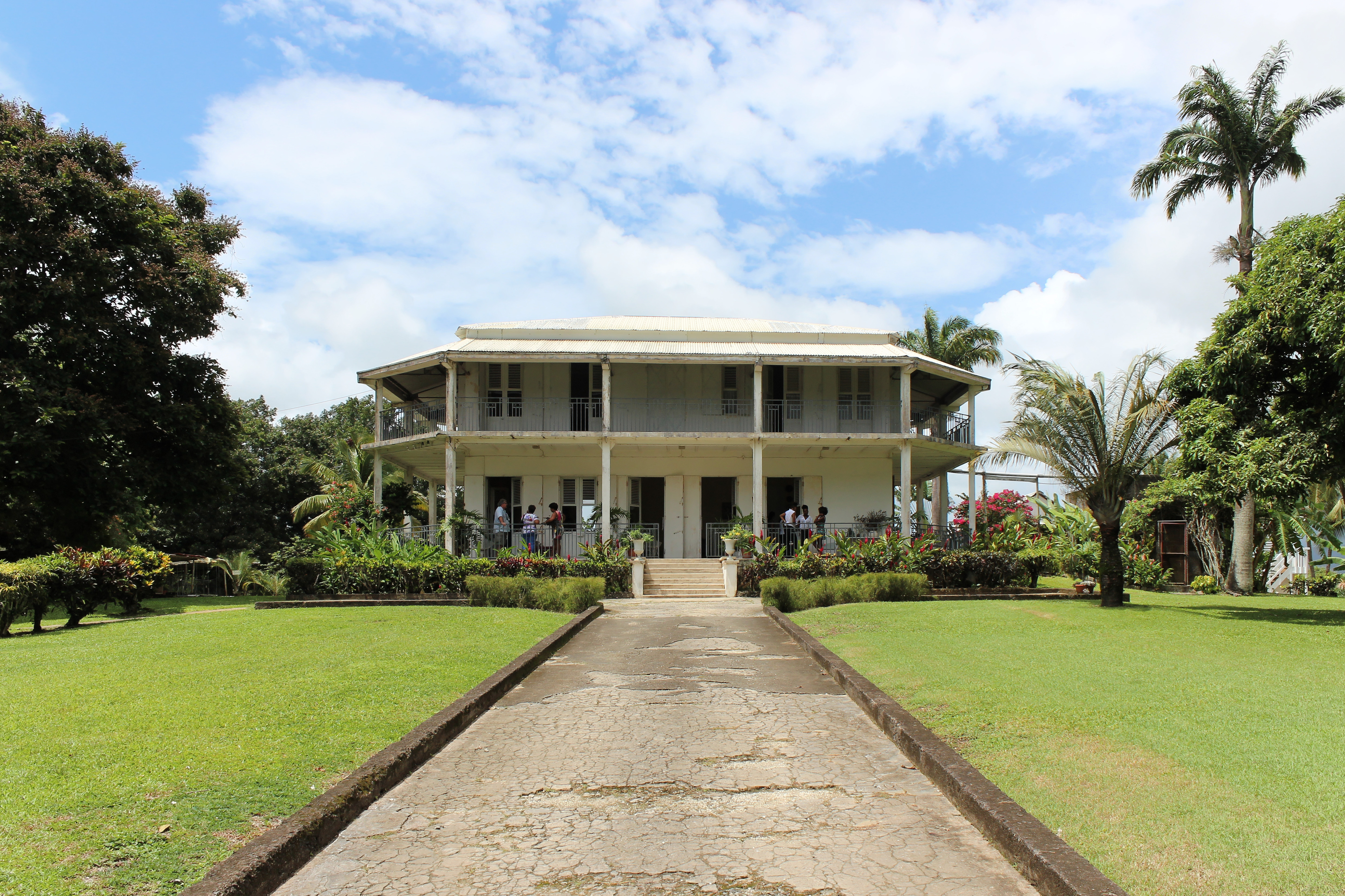 Habitation Routa, Lamentin, Guadeloupe